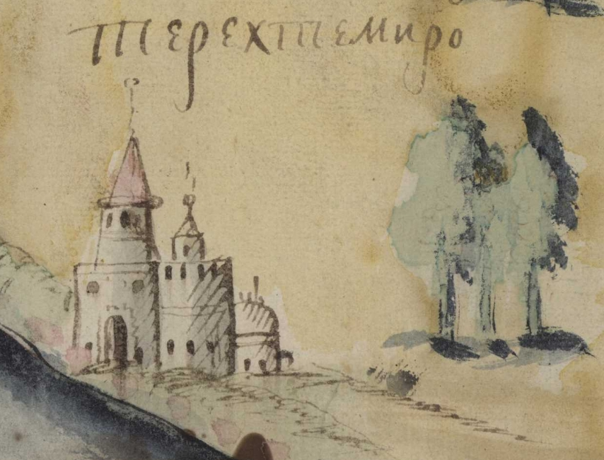 Фрагмент карти Київської губернії. XVIII століття. РГАДА, ф. 192, оп. 1, Киевская губ., № 5.